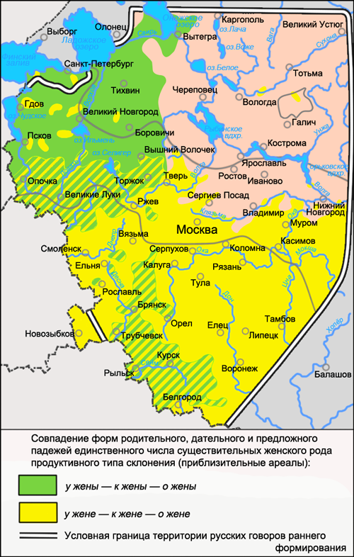 Карта распространения диалектного явления русского языка в области морфологии: совпадение форм родительного, дательного и предложного падежей единственного числа существительных женского рода продуктивного типа склонения: у жены́ — к жены́ — о жены́ и у жене́ — к жене́ — о жене́. Источник: Захарова К. Ф., Орлова В. Г., Сологуб А. И., Строганова Т. Ю. Образование севернорусского наречия и среднерусских говоров / Ответственный редактор В. Г. Орлова. — М.: «Наука», 1970. — с. 77 (карта 17).